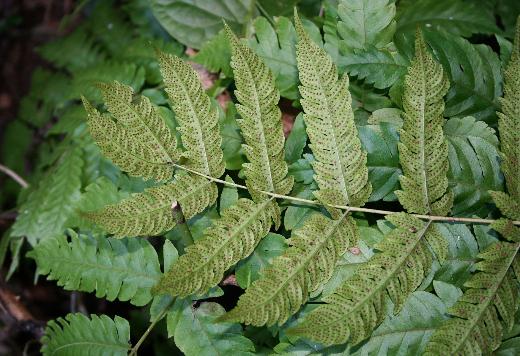 Tectaria paradoxa, Tectariaceae - Vietnam/Việt Nam: S Pa So, Phong Thổ (Prov. Lai Châu)